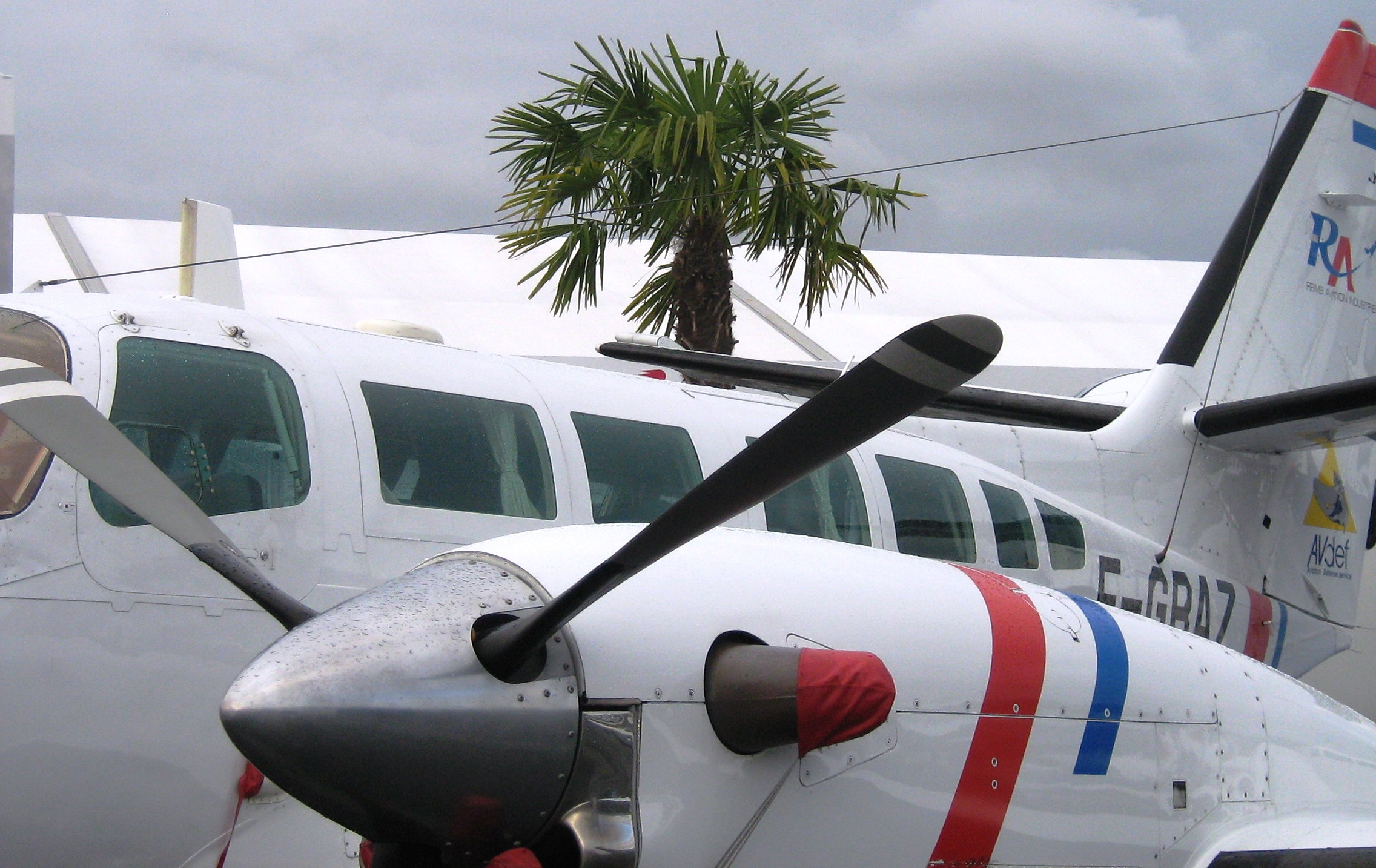 Antenne oblique en « V » renversé 2 à 23 MHz, tendue de la coque de l'avion à l'arrière de l'avion F-GRAZ au Bourget au Salon international de l'aéronautique et de l'espace 2011